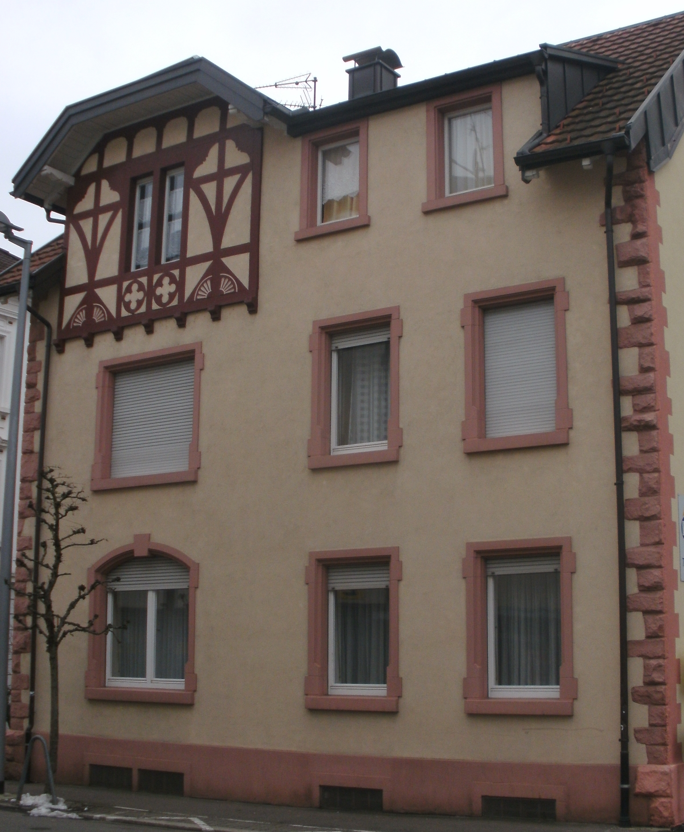 Haus aus der Gründerzeit mit Fachwerk in Rheinfelden, Karlsstraße; Elternhaus von Richard Kurth.